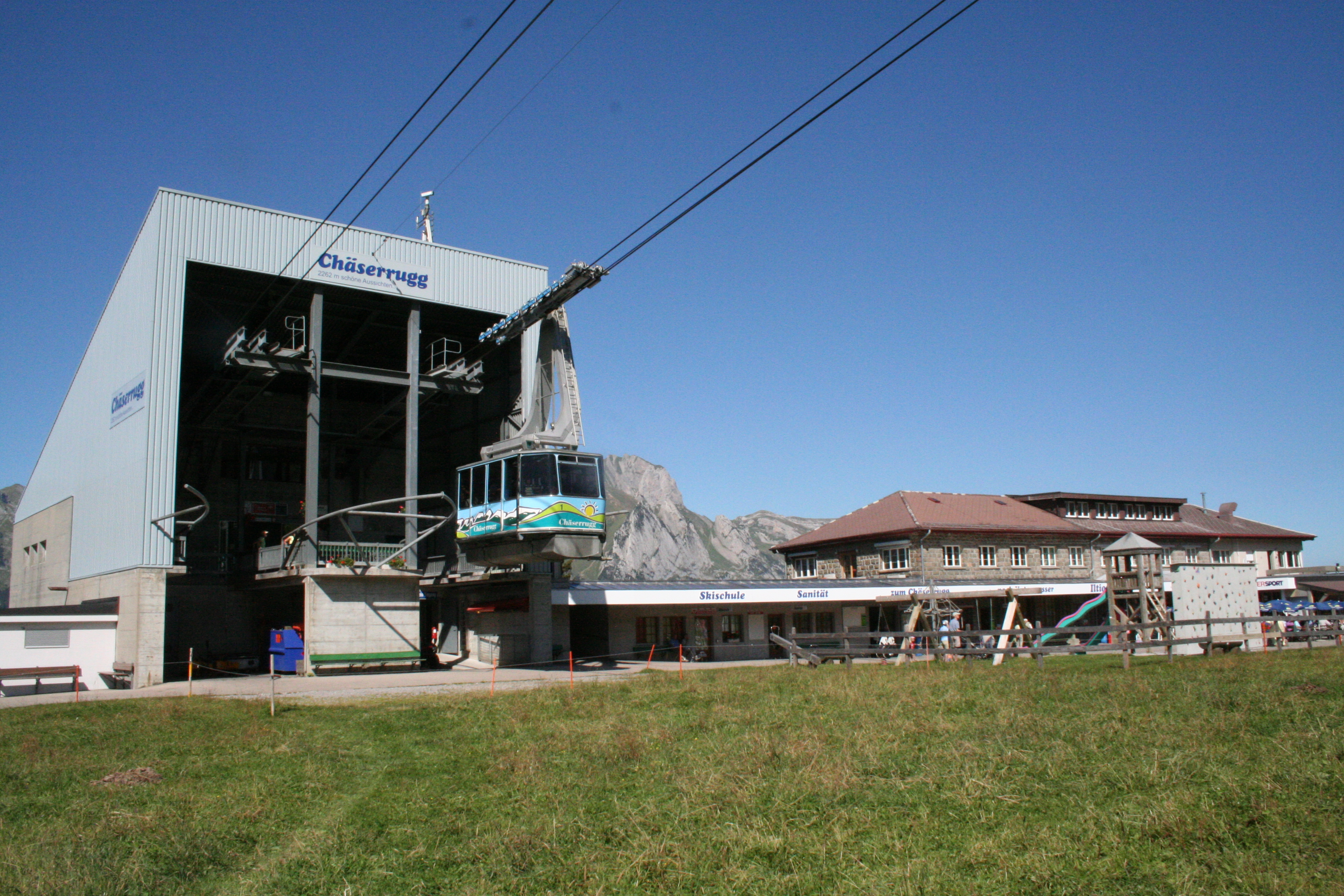 Station Iltios Chäserrugg